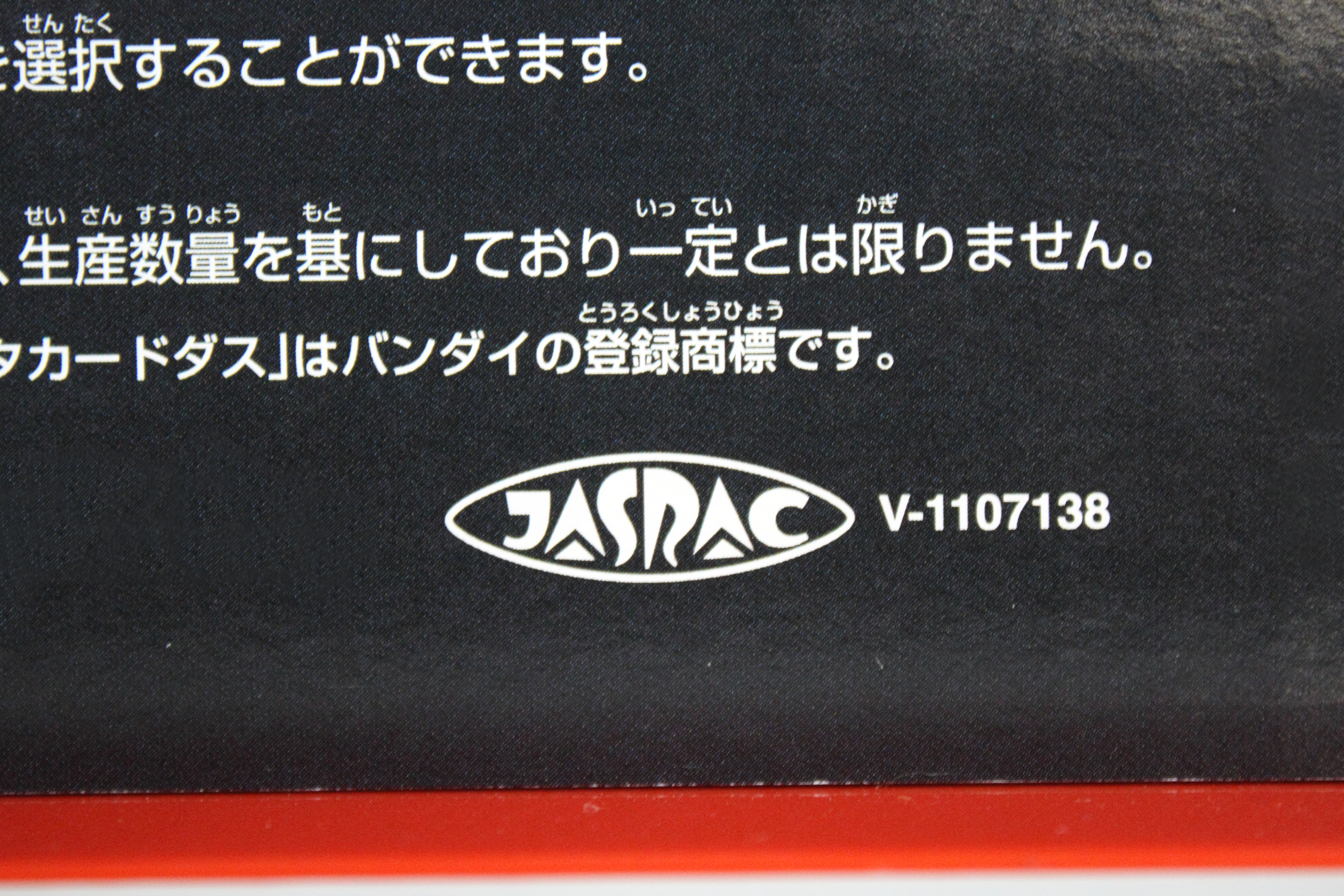 日本音楽著作権協会（JASRAC）の許諾マーク、許諾番号V-1107138。データカードダスにて。